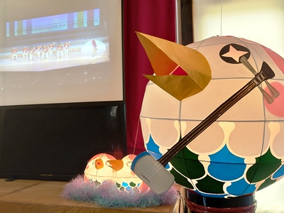 山絃堂で展示されている津軽三味線を構えたアマビエねぷた